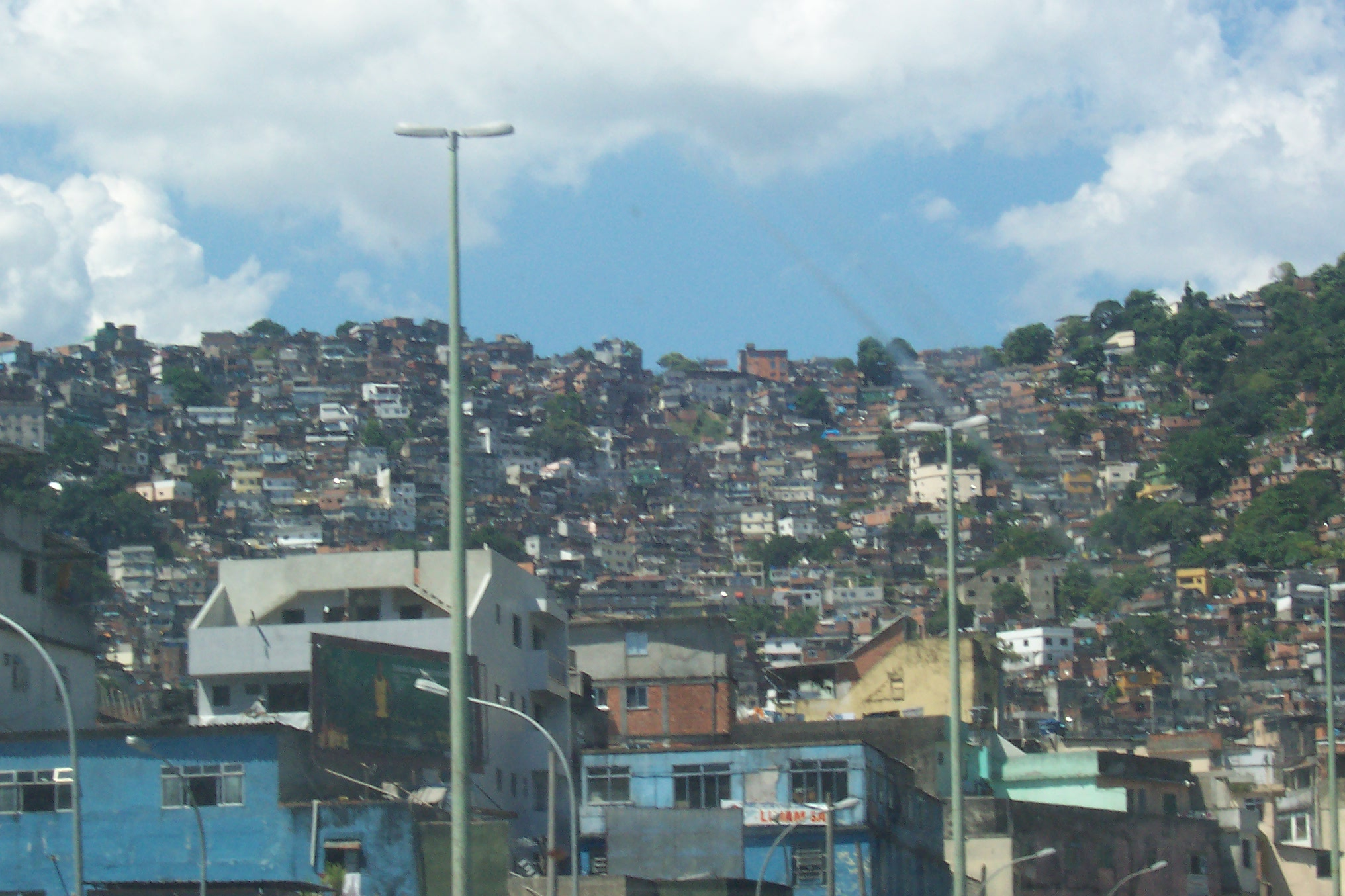 View of the Favela Rocinha, São Conrado, Rio de Janeiro.